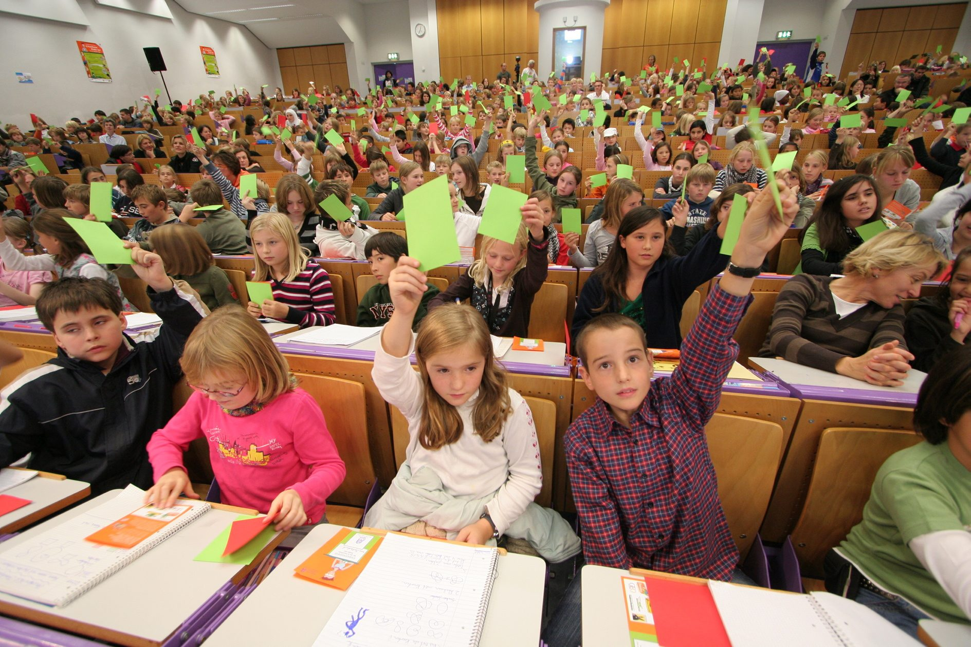 Kinderuni in Frankfurt am Main, Unicampus Westend.